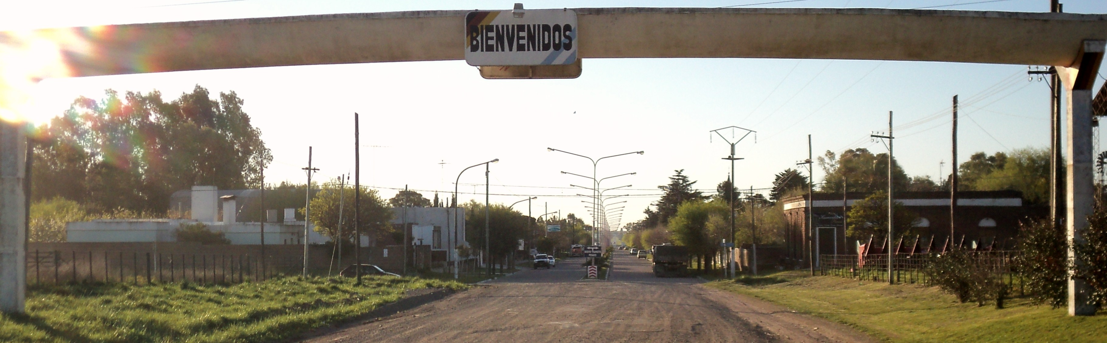 vista desde el arco de entrada del pueblo